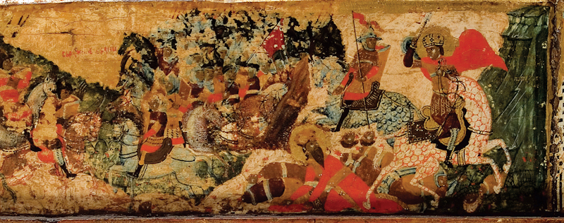 Душан убија бугарског краља Михаила (битка код Велбужда), Дечани, детаљ иконе Стефана Дечанског са житијем, крај XVI века.